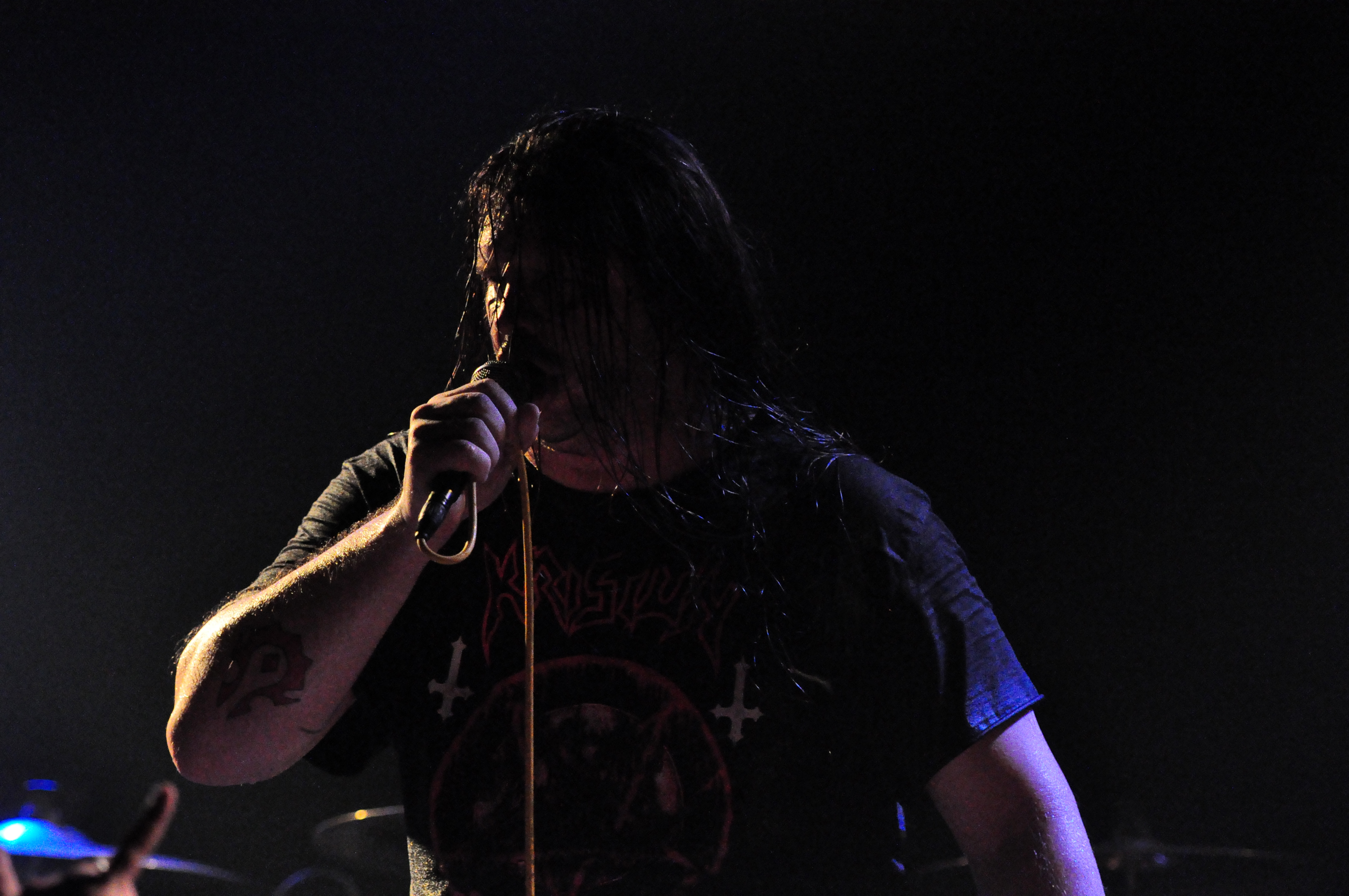 George "Corpsegrinder" Fisher in Rostock, 2012